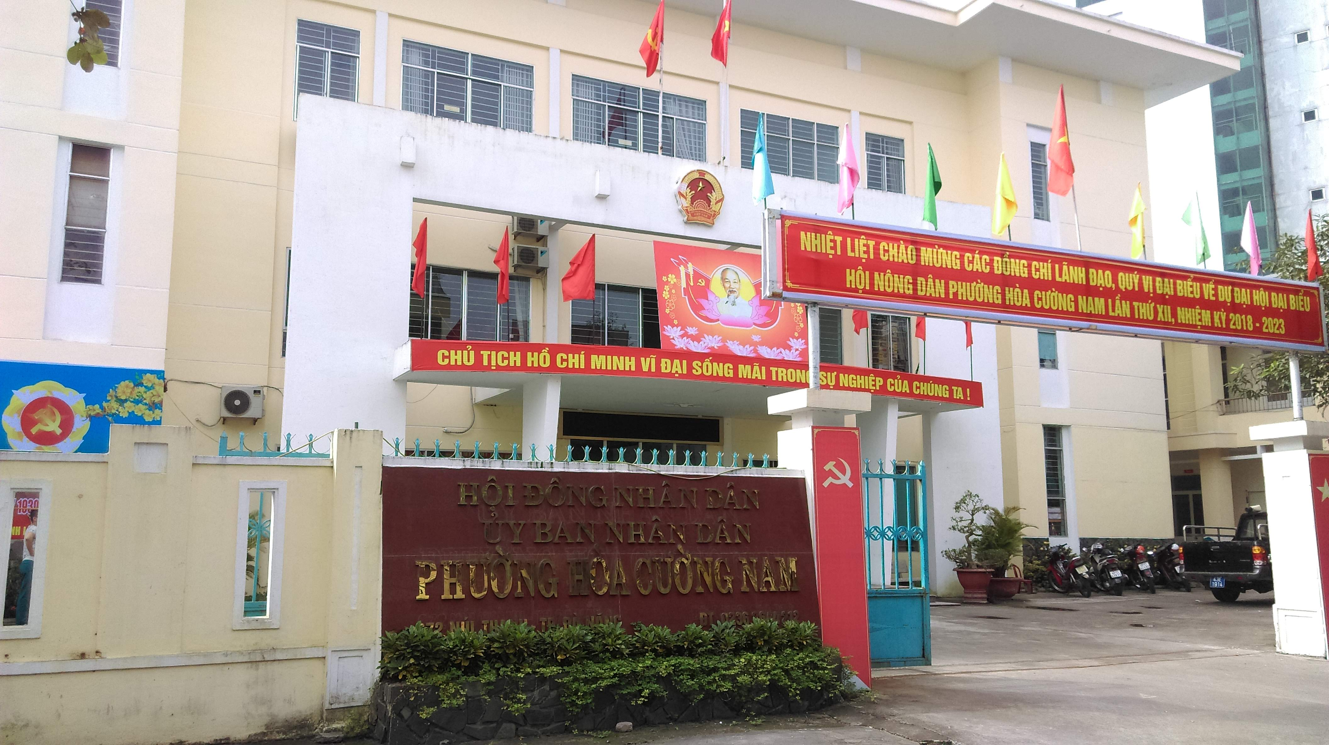 UBND phường Hòa Cường Nam, Hải Châu, Đà Nẵng